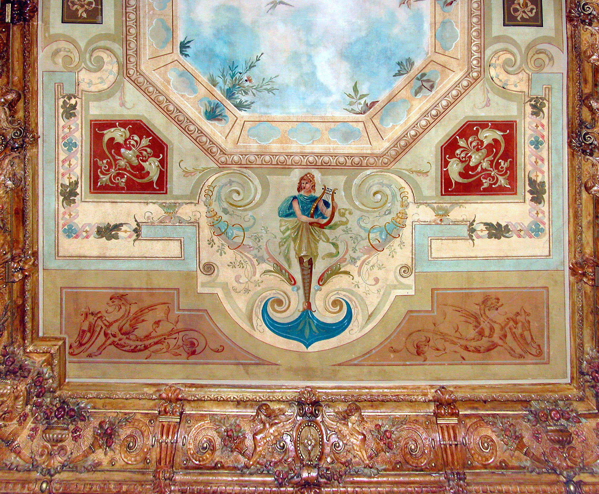 14.09.2007 01307 Dresden-Johannstadt: Mietshaus Pfotenhauerstraße 57 (erbaut um 1895). Decke der Hofdurchfahrt im Entree. [DSCN29514.TIF]20070914120DR.JPG(c)Blobelt